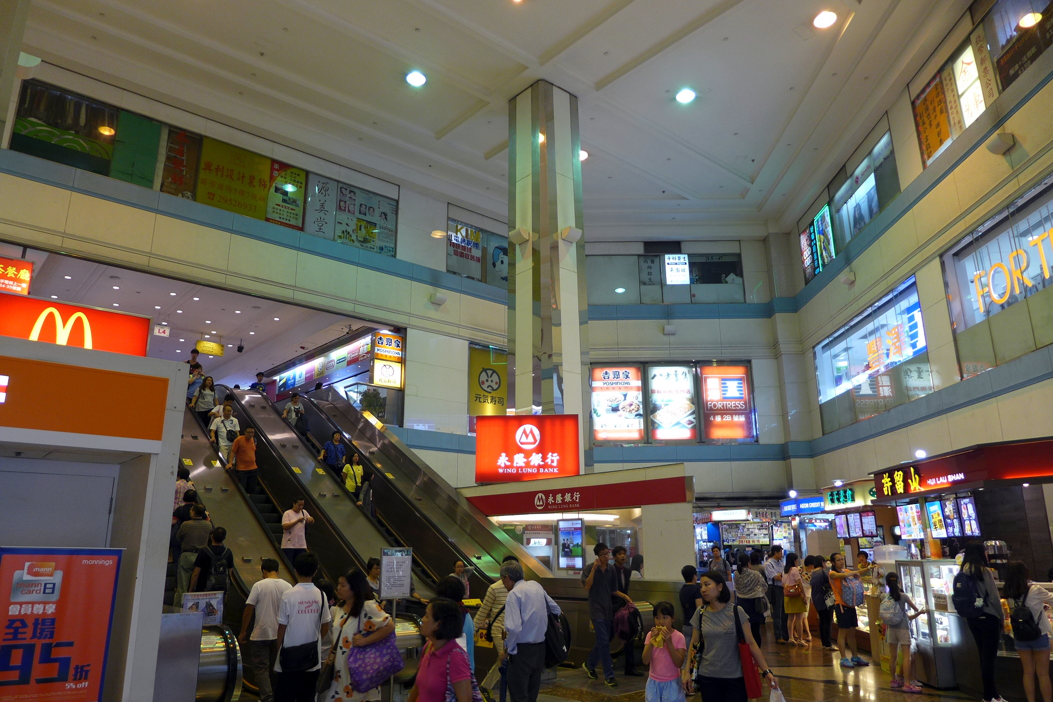 Sceneway Plaza Void